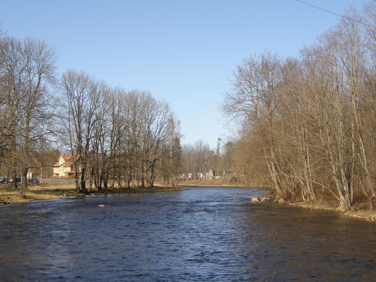 Põltsamaa jõgi Põltsamaal